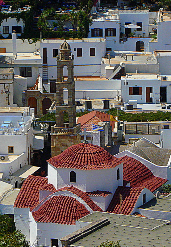 Rodos, kościół grecko-prawosławny p.w. Matki Boskiej Lindos. Stan obecny, to świątynia bizantyńska z XIII wieku, niemniej pierwszy ze zbudowanych tu kościołów datowany jest na V wiek i zachowały się fragmenty jego fundamentów. Czynny liturgicznie obiekt, stanowi jednocześnie część podległego Ministerstwu Kultury i Turystyki Muzeum Kościelnego Lindos. Istny "Skarbiec Ikon" - polichromie zachwycają bogactwem motywów i ich wykonania. Zaciekawia cykl scen Sądu Ostatecznego oraz rzadkie w ikonografii przedstawienie Św. Krzysztofa, jako człowieka z głową psa. Najważniejsze części dekoracji tej świątyni prawosławnej powstały dzięki mecenatowi Wielkiego Mistrza Zakonu Ioannitów, rycerza D’Aubusson czyli, jak pokreślają to niektóre źródła greckie, są one zasługą heretyka.